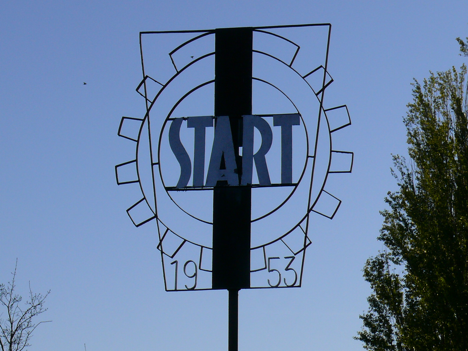 logo Startu w Łódź